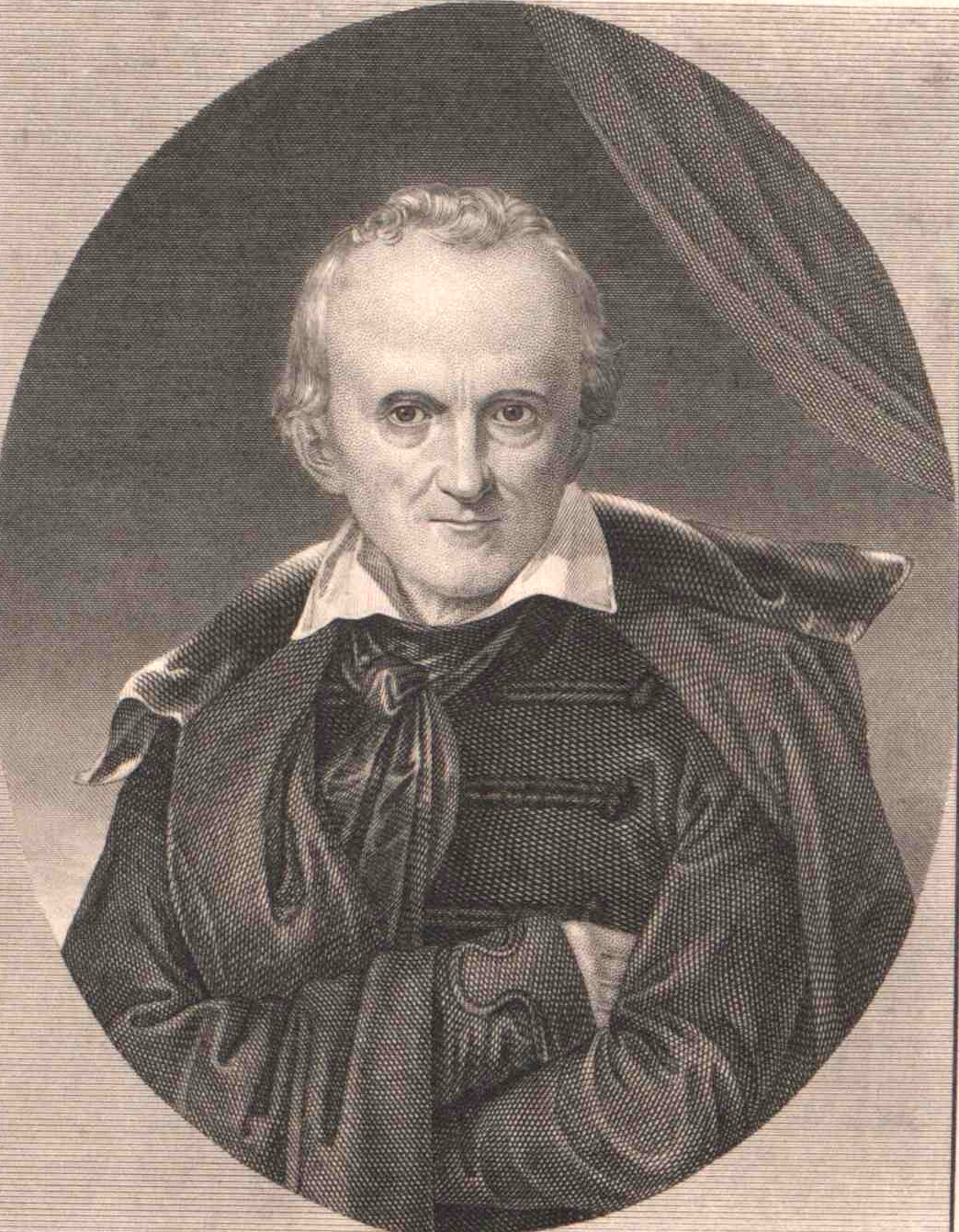 Kazinczy Ferenc (1759 - 1831)